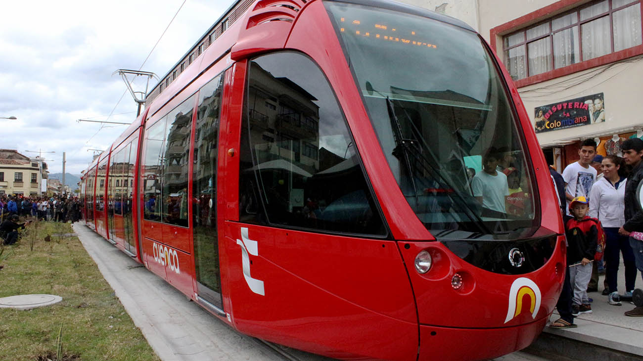 El Tranvía de Cuenca (Ecuador) durante un recorrido de prueba el 27 de julio de 2018.